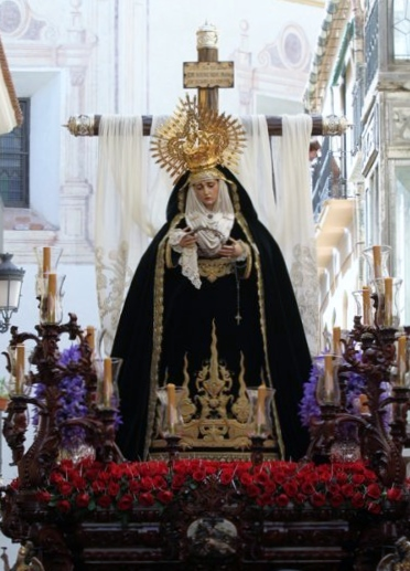 Cofradía de la Santa Cruz (Málaga)